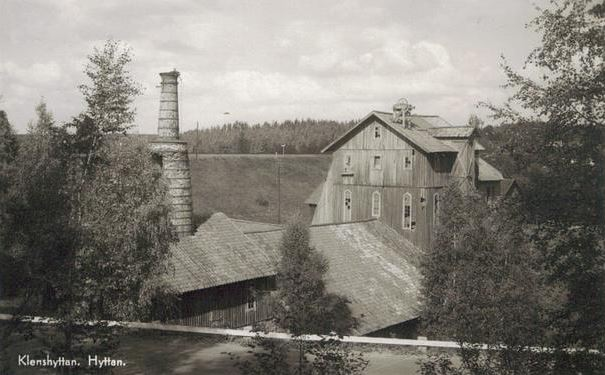 Klenshyttan